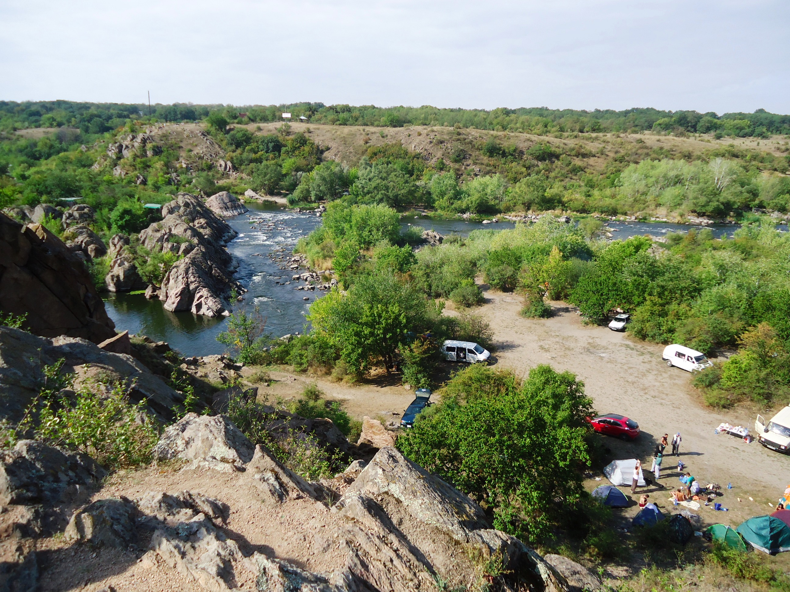 Мигійські пороги / Myhiyski Rapids